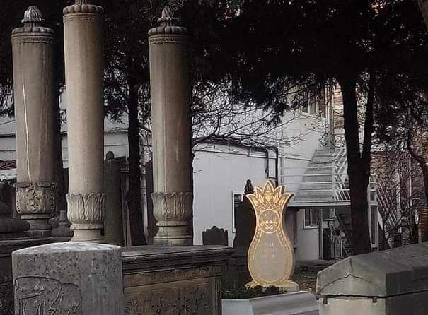 Şule Yüksel Şenler'in Eyüp Sultan Mihrişah Valide Sultan Külliyesi Haziresinde yer alan kabri